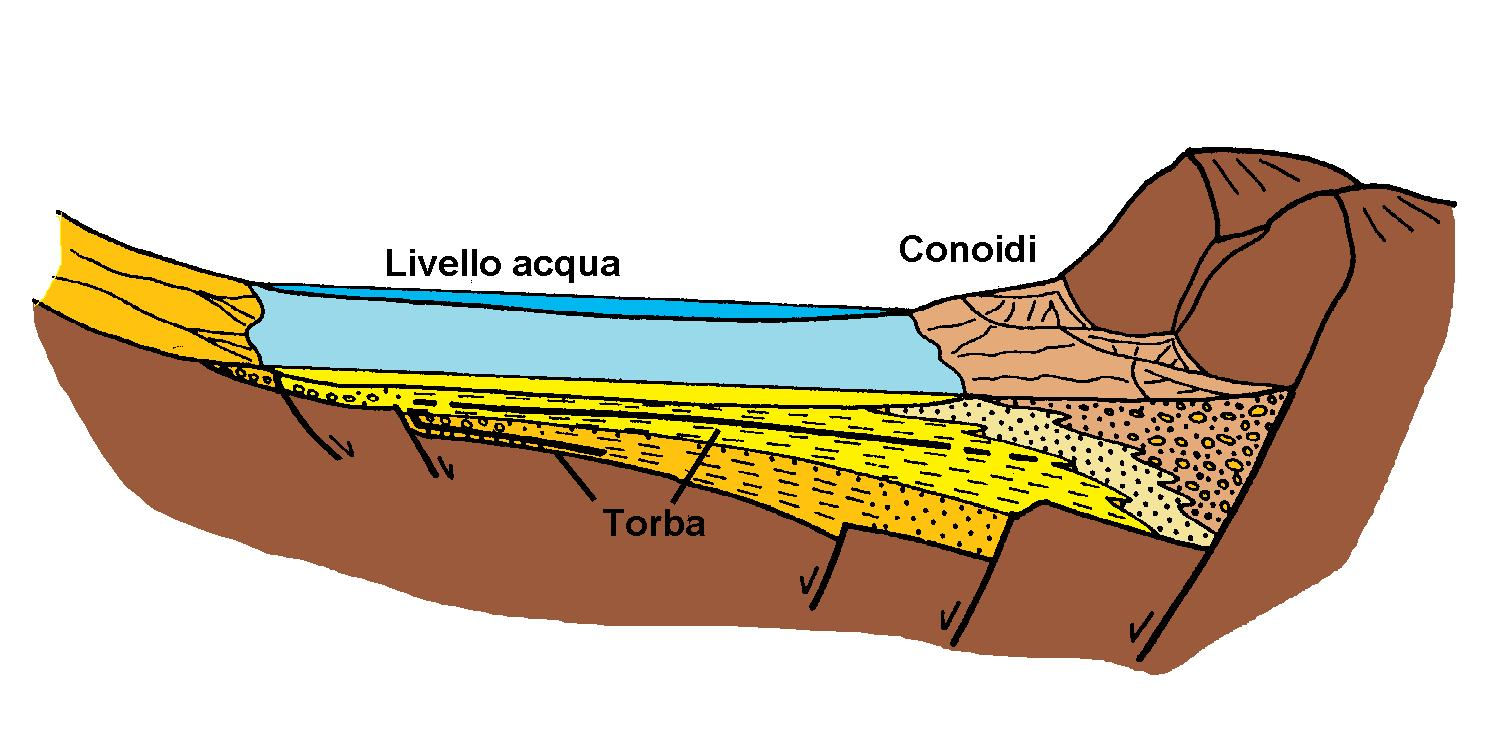 Seconda fase fluvio-lacustre con cospicui apporti terrigeni dai versanti del Pratomagno